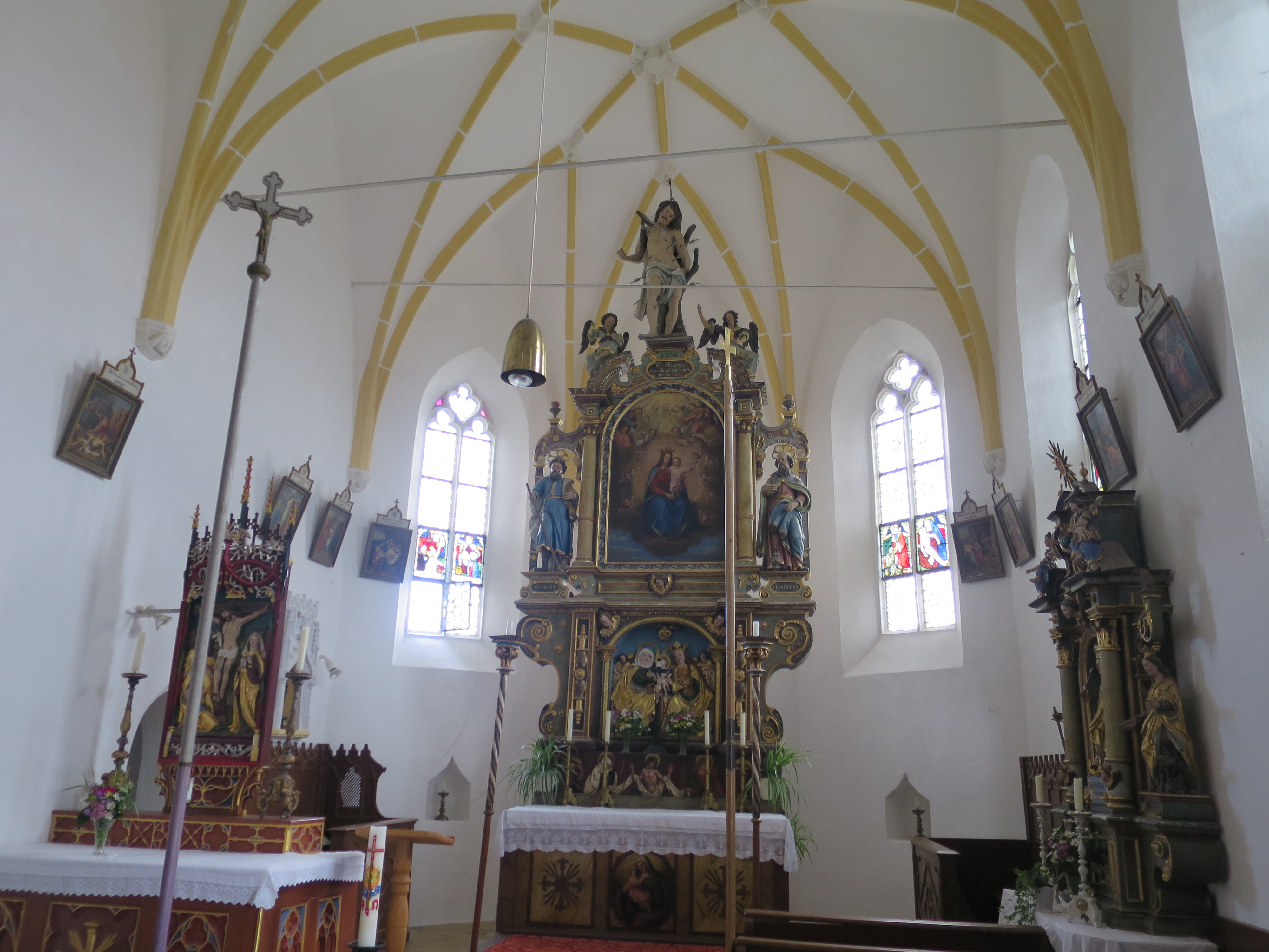 Chorraum der Kirche St. Anna